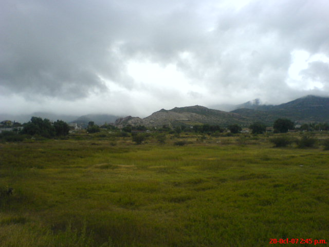 paisaje de actopan durante la temporada de lluvias